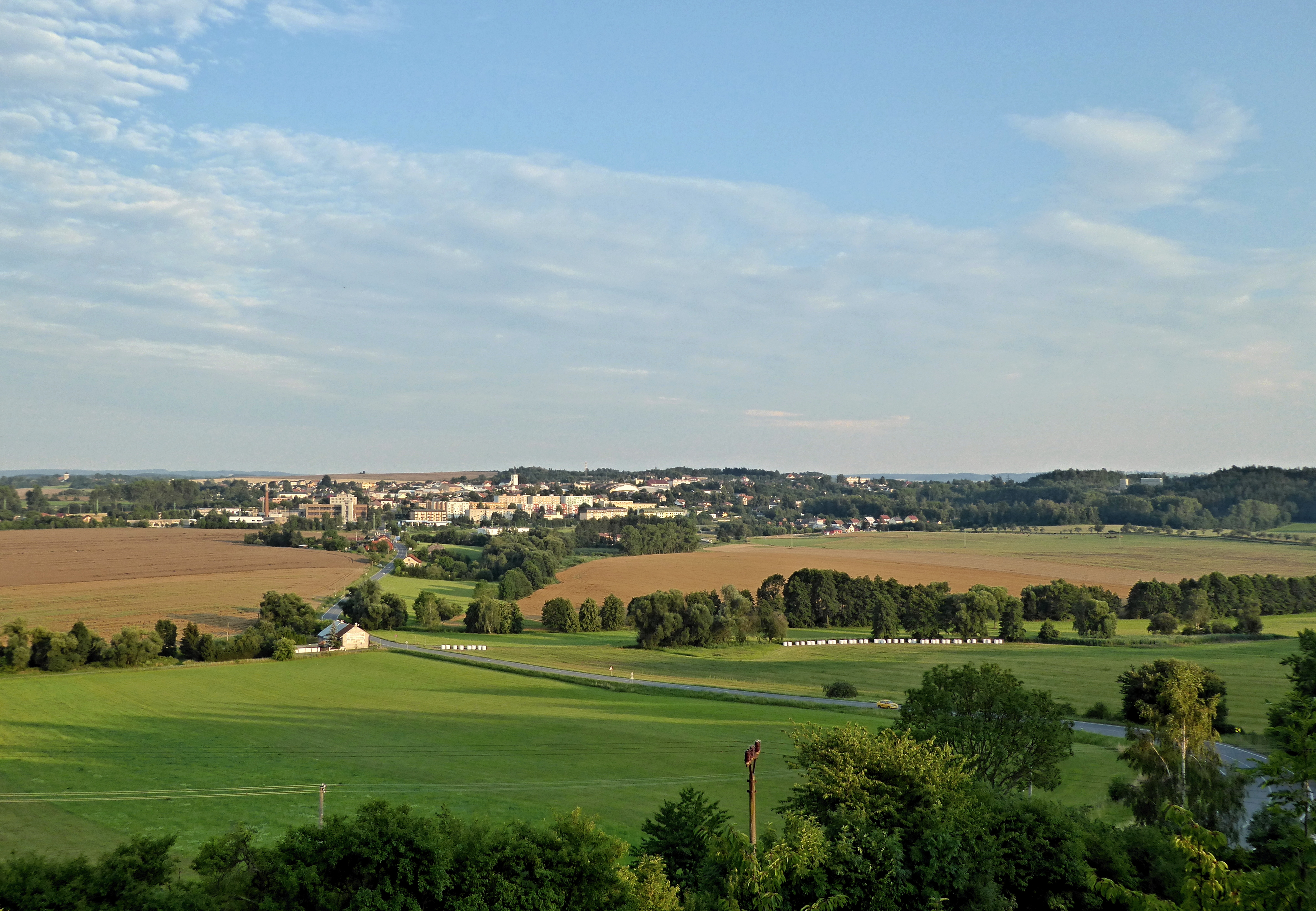 Skuteč dala název geomorfologickému okrsku Skutečská pahorkatina. Město leží na severním svahu vyvýšeniny Humperky (v záběru uprostřed), jejíž vrchol dosahoval 469 m n.m. a v dávné minulosti na něm stávalo hradiště u obchodní cesty vedoucí z Chrudimi na Trstenickou stezku u Litomyšle. V době rozvíjejícího se průmyslu v českých zemích se Humperky staly zdrojem stavebního kamene pro budování silnic a železničních tratí a vrcholová část byla vytěžena (lomová jáma 422,9 m n.m.). V záběru vpravo jsou patrné technologické objekty kamenolomu Litická v zalesněném návrší Horka. Ve významné lomařské oblasti se těžila i tzv. Skutečská žula. Lokalita dnes ukrývá mnoho bývalých kamenolomů, z velké části zatopených vodou. K připomenutí kamenické tradice a historie kamenoprůmyslu vznikla v roce 2015 kolem bývalých lomařských jam a zbytků bývalých provozů vedená trasa Žulové naučné stezky. Je spojena i s významnou geologickou lokalitou Lomy v okolí Leštinky. Skutečská pahorkatina je jedním ze čtyř geomorfologických okrsků Sečské vrchoviny Železných hor. Záběr byl pořízen od Přibylova (místní části Skutče, dole se silnicí č. 358 od Chrudimi), ze svahů geomorfologického okrsku Štěpánovská stupňovina Chrudimské tabule Svitavské pahorkatiny.